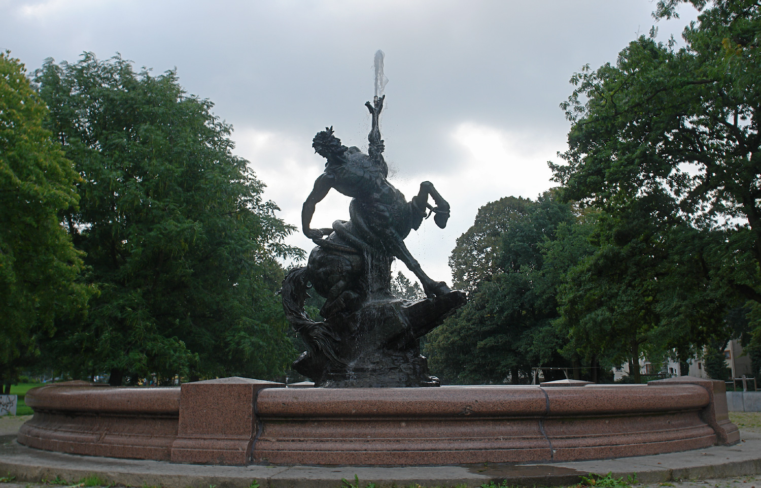 Bremen: Centaurenbrunnen am Leibnizplatz. Entwurf und Ausführung: August Sommer, errichtet 1891 Schwachhauser Heerstraße / Bismarckstraße), Umzug 1958 Das abgebildete Objekt ist ein geschütztes Kulturdenkmal in der Freien Hansestadt Bremen, mit der Nr. 0937 beim Landesamt für Denkmalpflege registriert. k: kunst im öffentlichen raum bremen